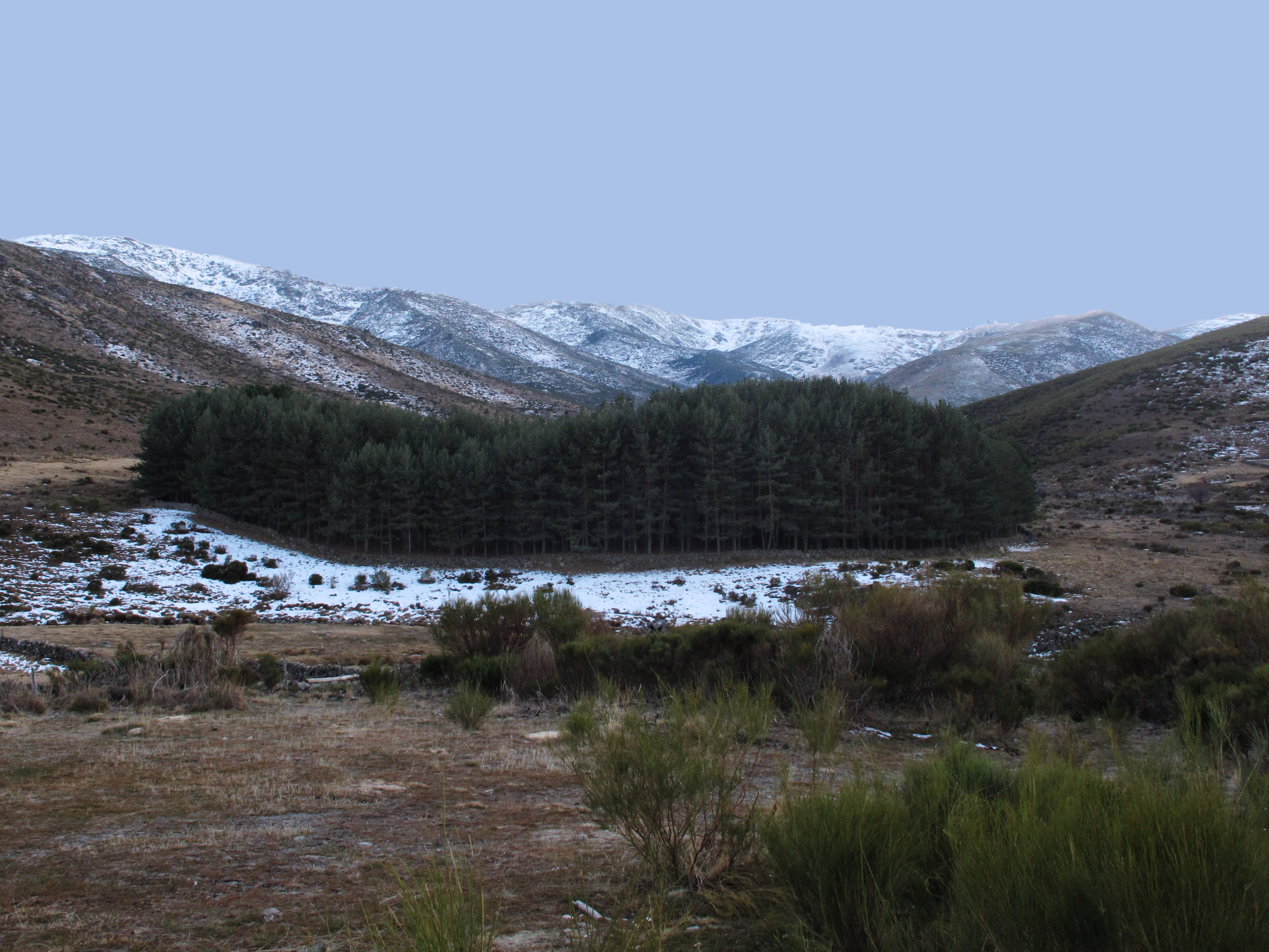 En su sector intermedio, en concreto en el extremo meridional de la provincia de Ávila y como un pesado e impenetrable murallón granítico, se alza la Sierra de Gredos. Es el feudo de la capra hispánica. Los bancales son utilizados en la agricultura para cultivar la tierra en pendiente, para disminuir la erosión .